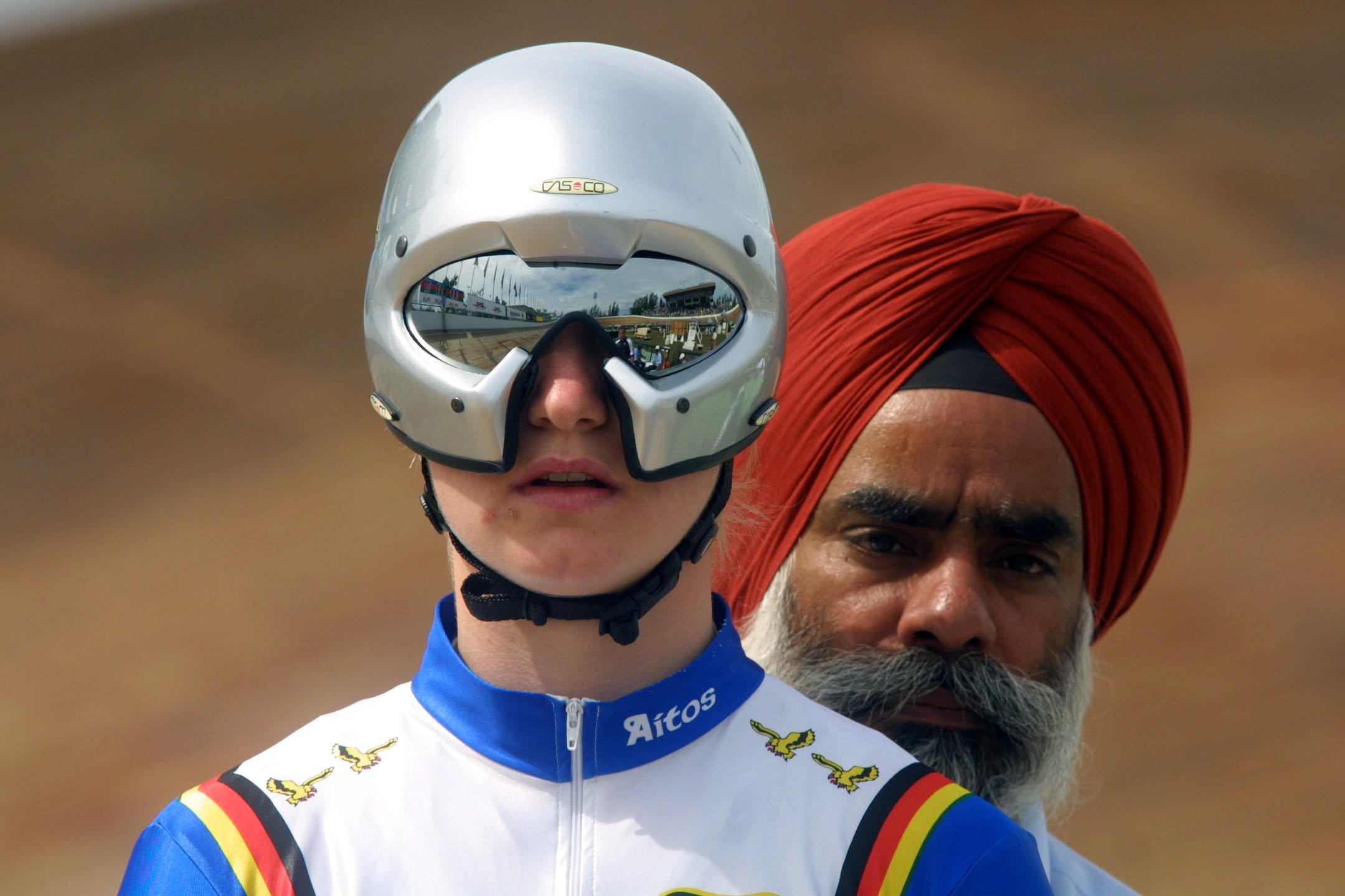 Katrin Meinke (BDR) am Start zum 500-Meter-Zeitfahren Frauen mit einem UCI-Kommissär aus Malaysia (Bahn-Weltcup Ipoh, Malaysia, 2001. Ausgezeichnet mit dem Sven-Simon-Preis für die beste Sportfotografie des Jahres 2001.)